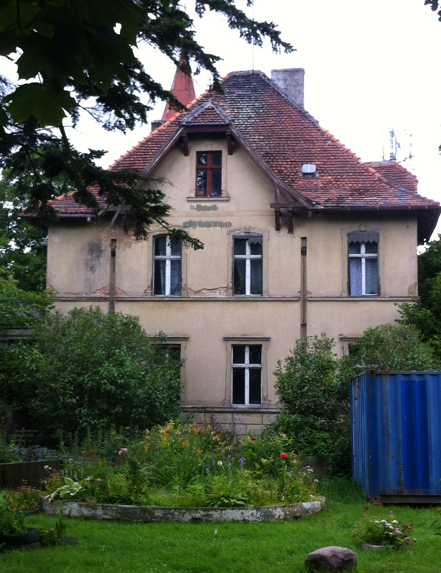 Willa Ulica Górna 7, Szczecin-Bukowo Obiekt wpisany do rejestru zabytków województwa zachodniopomorskiego Nr rejestru A-1129, nr decyzji 1113/2012 z dn. 24.09.2012 r.